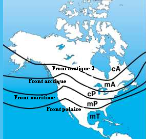 Masses d'air selon la théorie de l'École norvégienne de Météorologie/Airmasses according to the Norwegian model (A= Arctique, P=Polaire, T=Tropical, m=maritime, C=Continental)